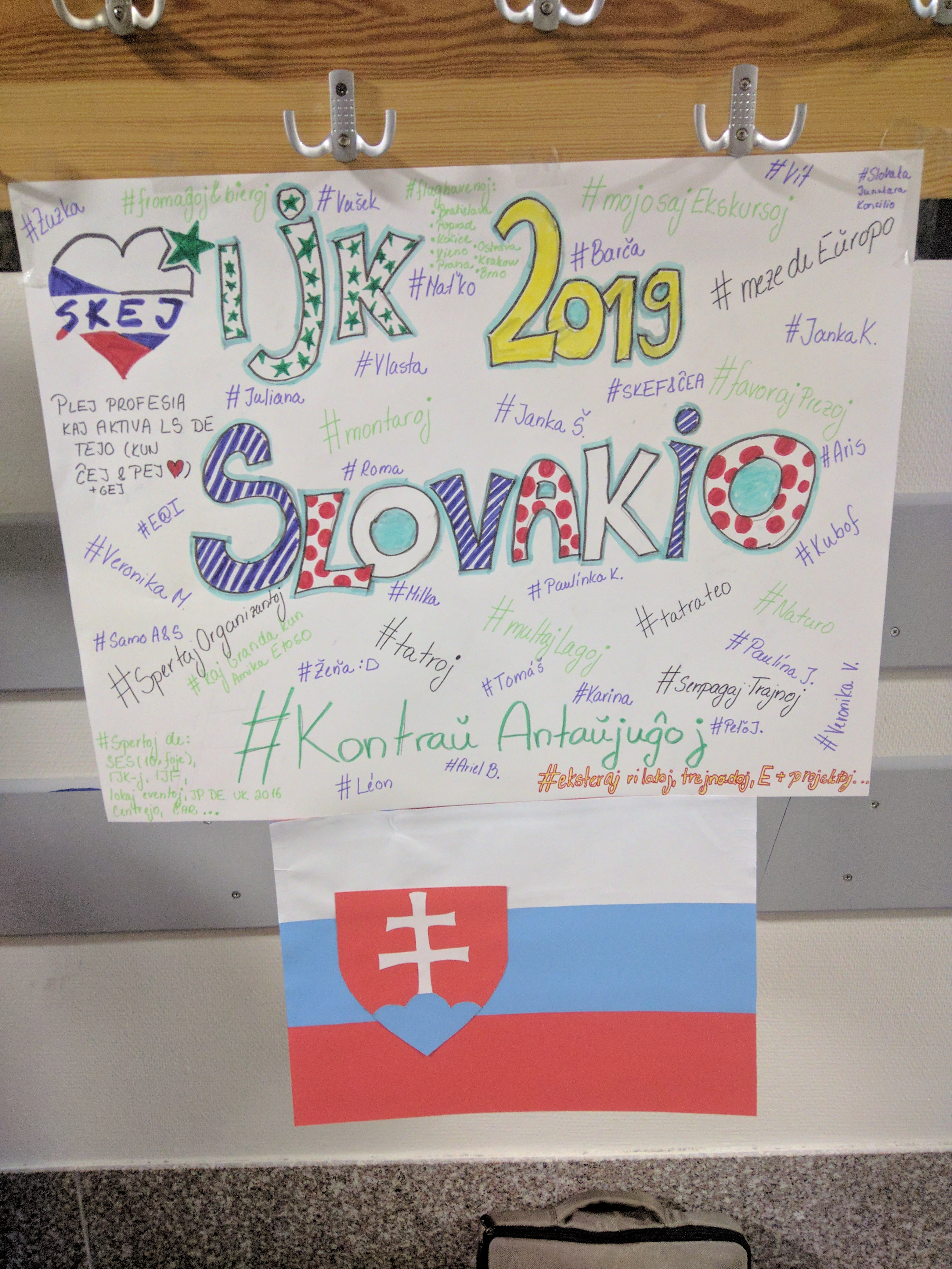 IJK en Slovakio